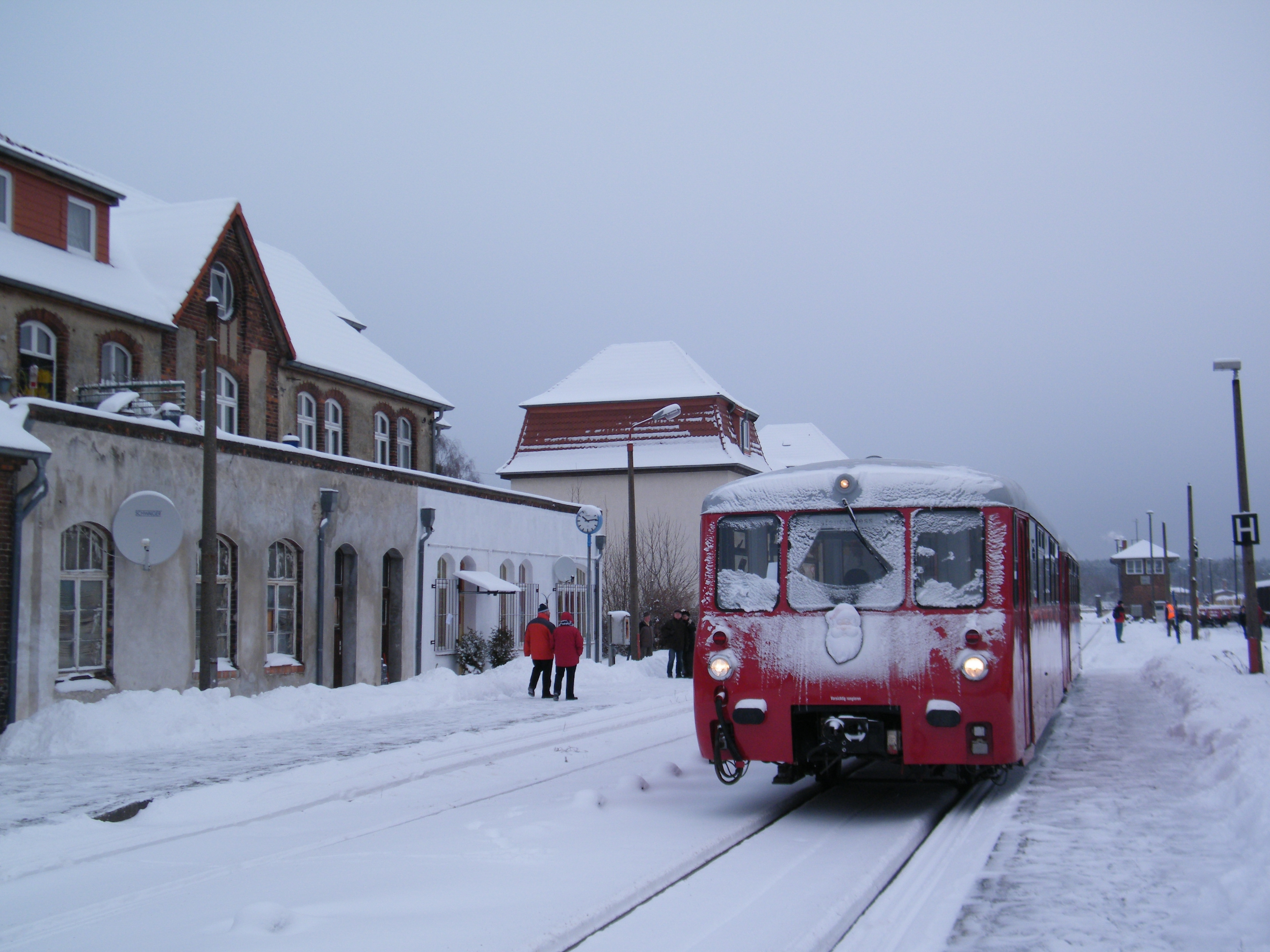 Bahnsteig des Bahnhofs Neustrelitz Süd, Dezember 2010 mit einer Sonderfahrt nach Feldberg